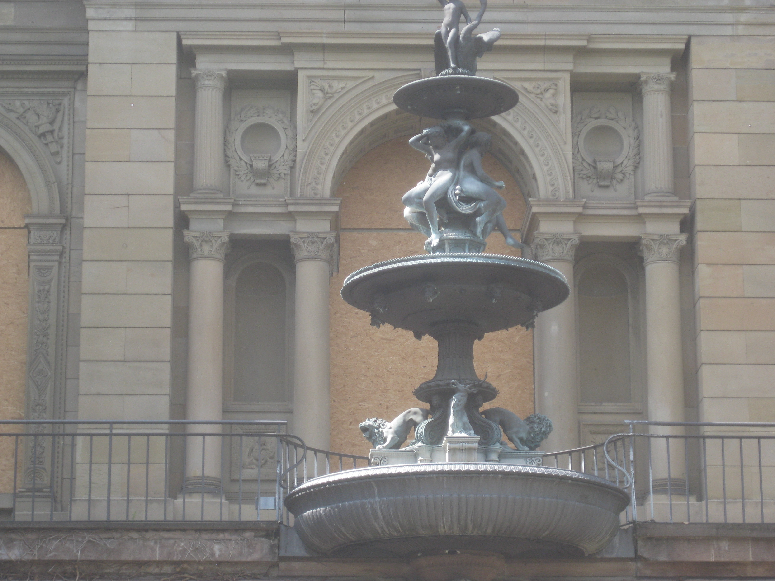 Mittelportal und Nymphenbrunnen an der Ostfassade der Villa Berg in Stuttgart, 2011.